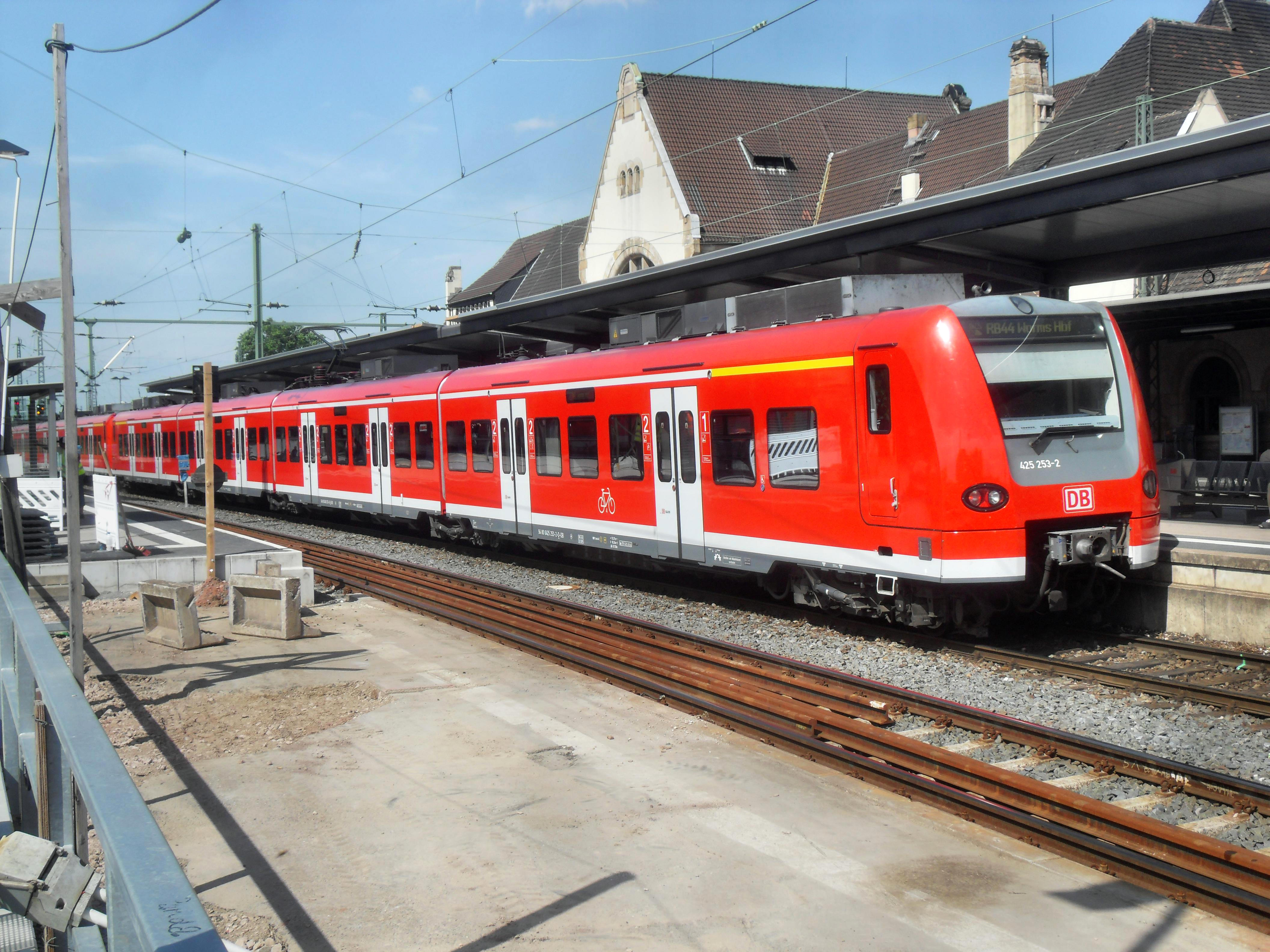 RegionalBahn mit Triebwagen der DBAG-Baureihe 425 im Wormser Hauptbahnhof nach Ankunft vom Mannheimer Hauptbahnhof (Deutschland)